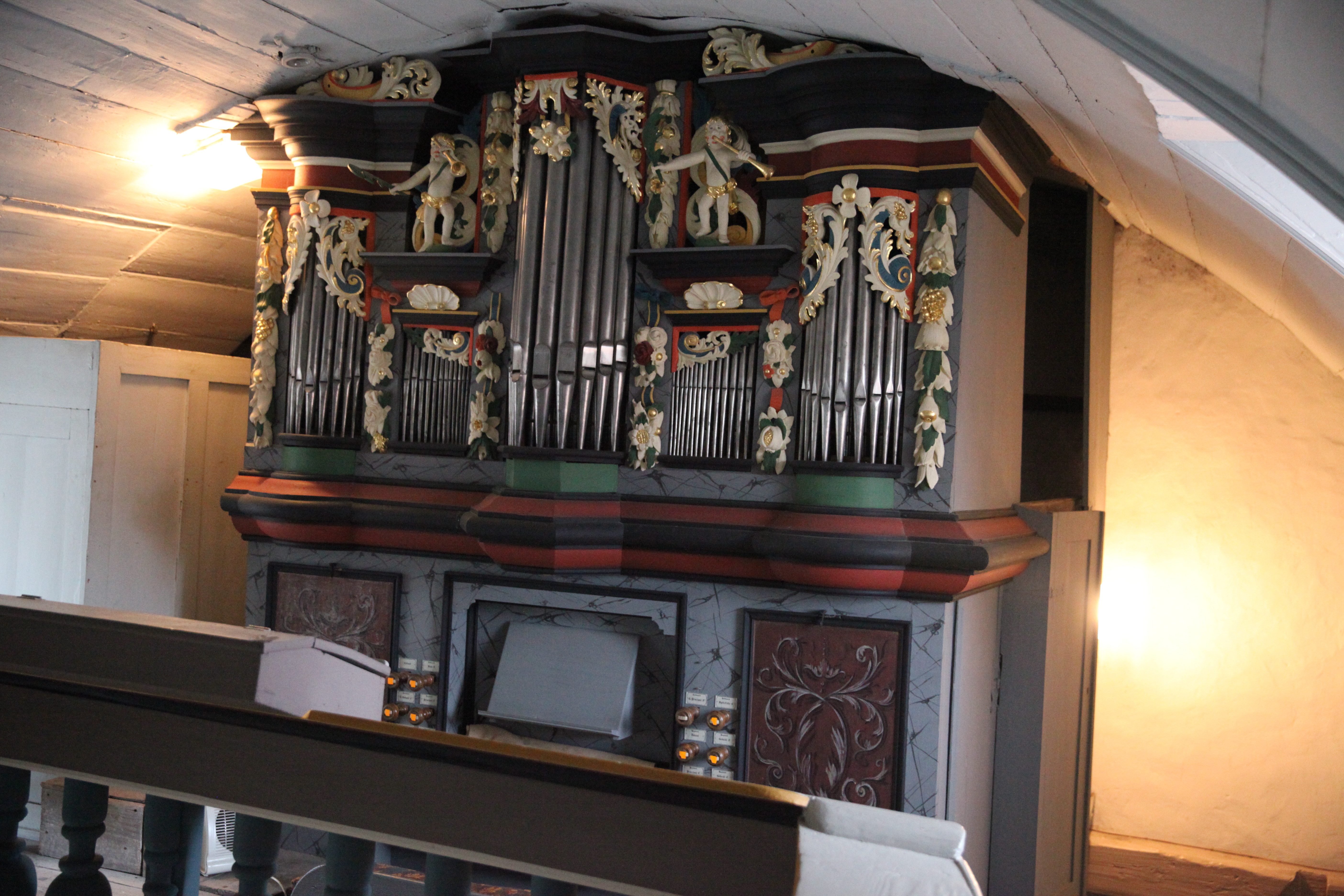 Orgel, Evangelisch-Lutherische Filialkirche St. Anna in Töttleben